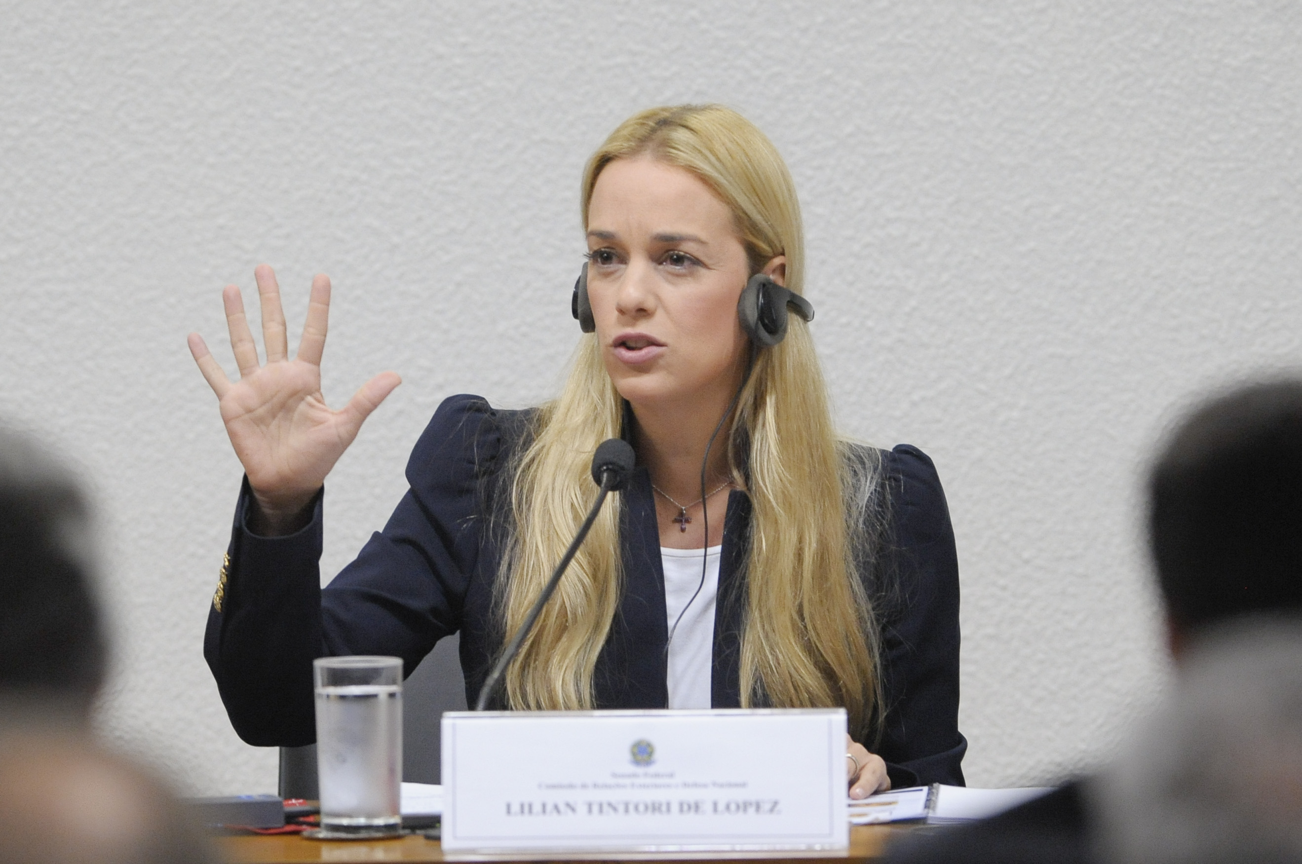 Sala de comissões do Senado durante a Comissão de Relações Exteriores e Defesa Nacional que realiza audiência pública interativa para tratar da situação política da Venezuela, que culminou com violações de direitos humanos e a prisão política de políticos oposicionistas ao governo nacional. Em pronunciamento, Lilian Tintori de Lopez. Foto: Pedro França/Agência Senado